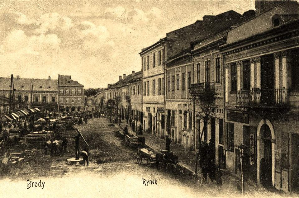 Південна забудова Площі ринок у Бродах